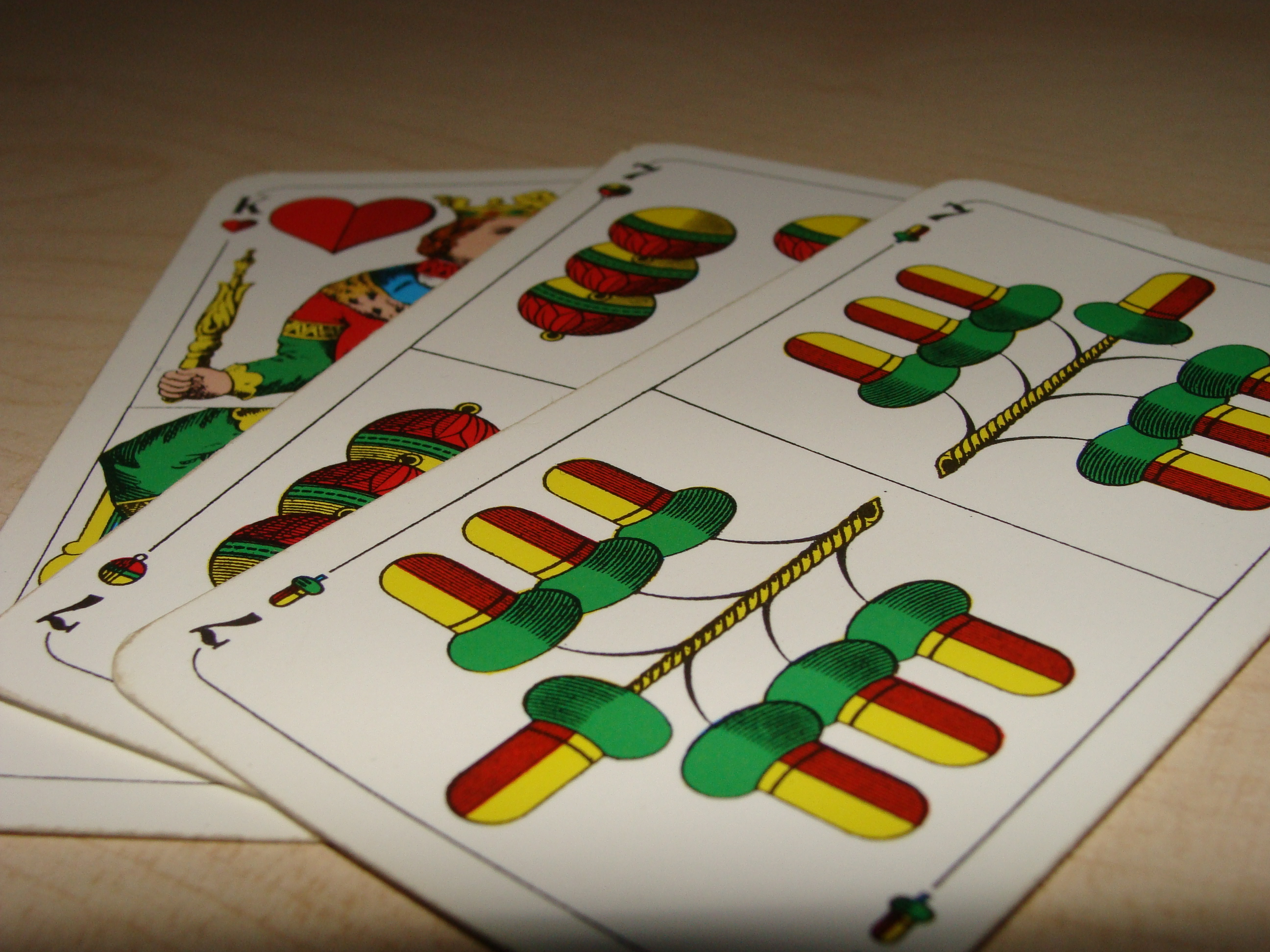 Max, Bello und Sächer. Die "Kritten" beim Waddeln/Watten.